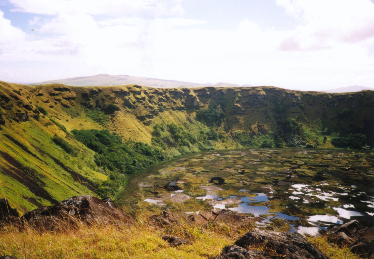 Totora-Schilf (Scirpus californicus) im Krater des Rano Kao, Osterinsel